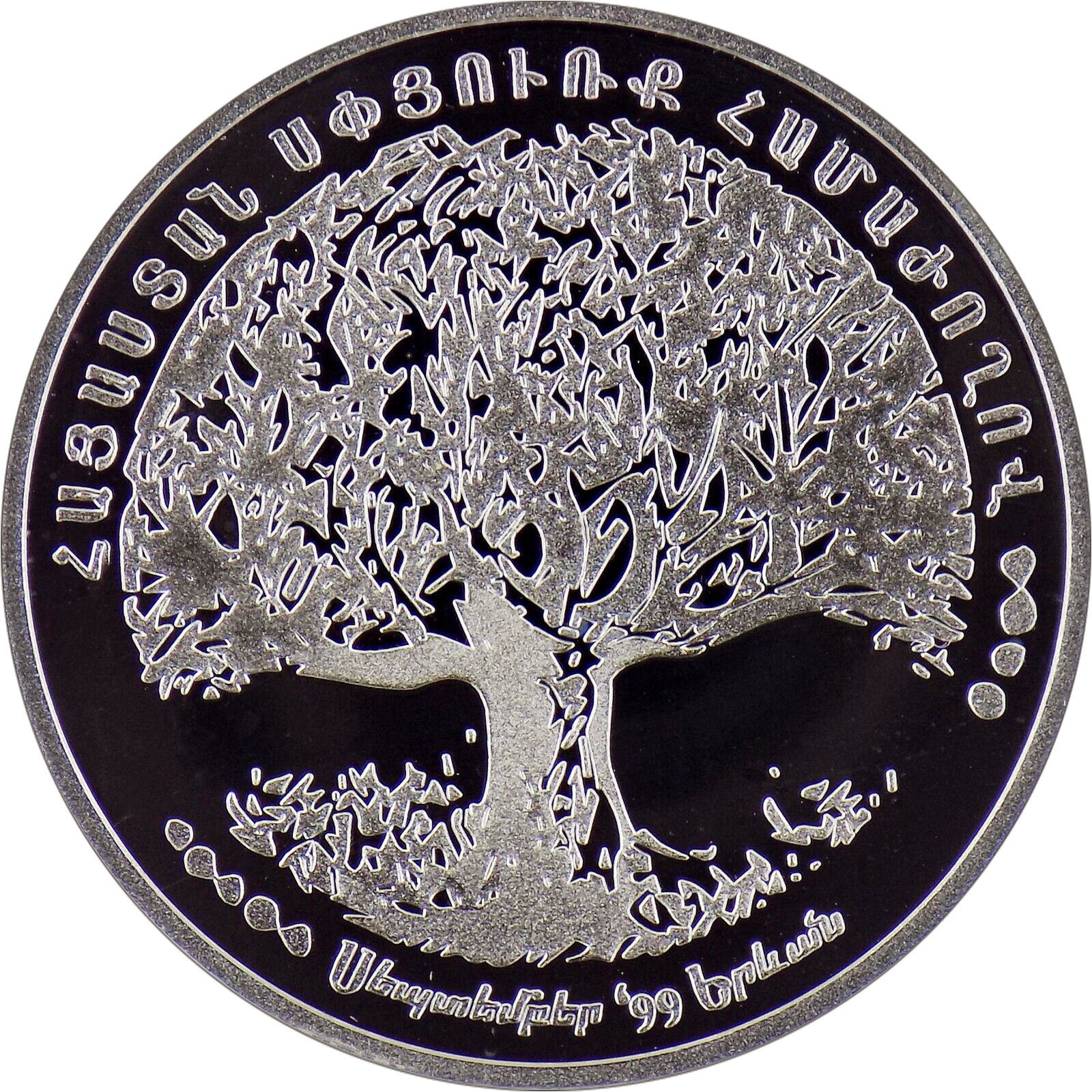 Памятная монета Армении 1999 года "Спюрк" - 5000 драм - серебро 999